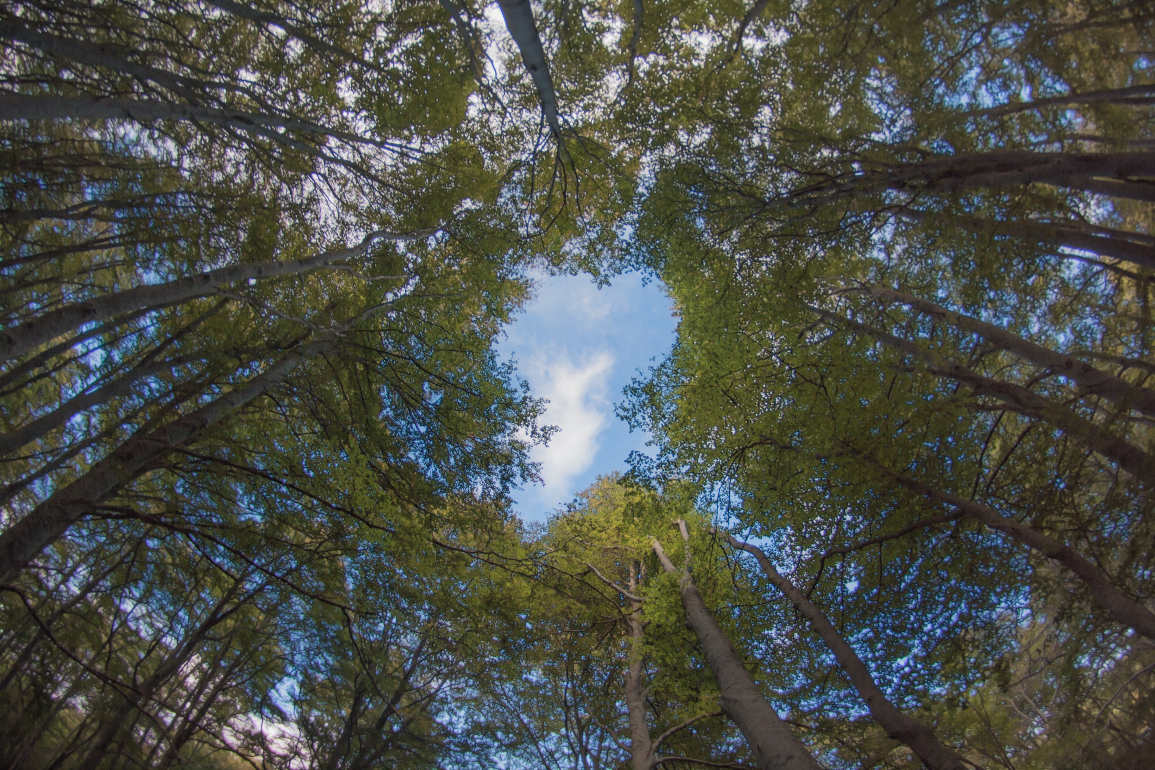 Dehesa del Moncayo, España